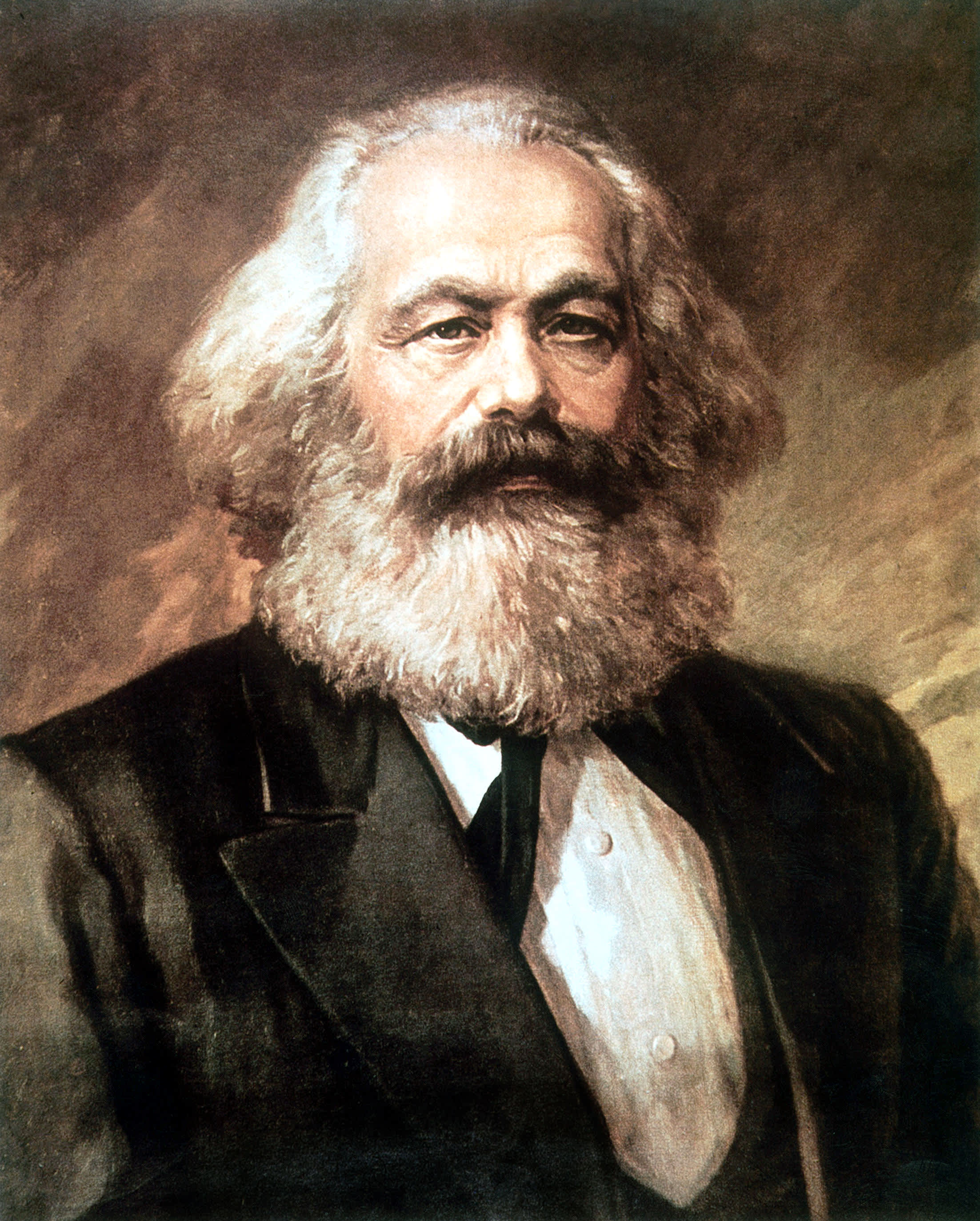 Karl Marx (1818-1883)